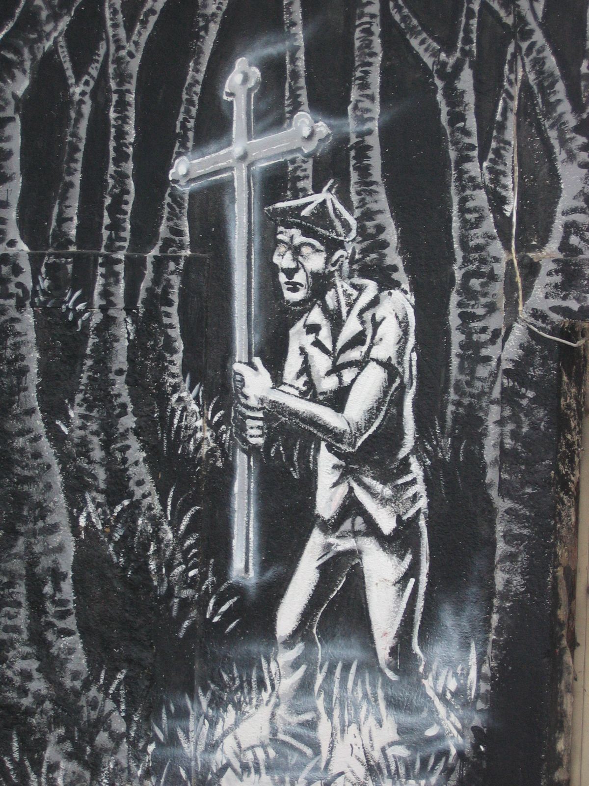 A Santa Compaña (detalle Igraffiti) na rúa Almirante Matos, Pontevedra).